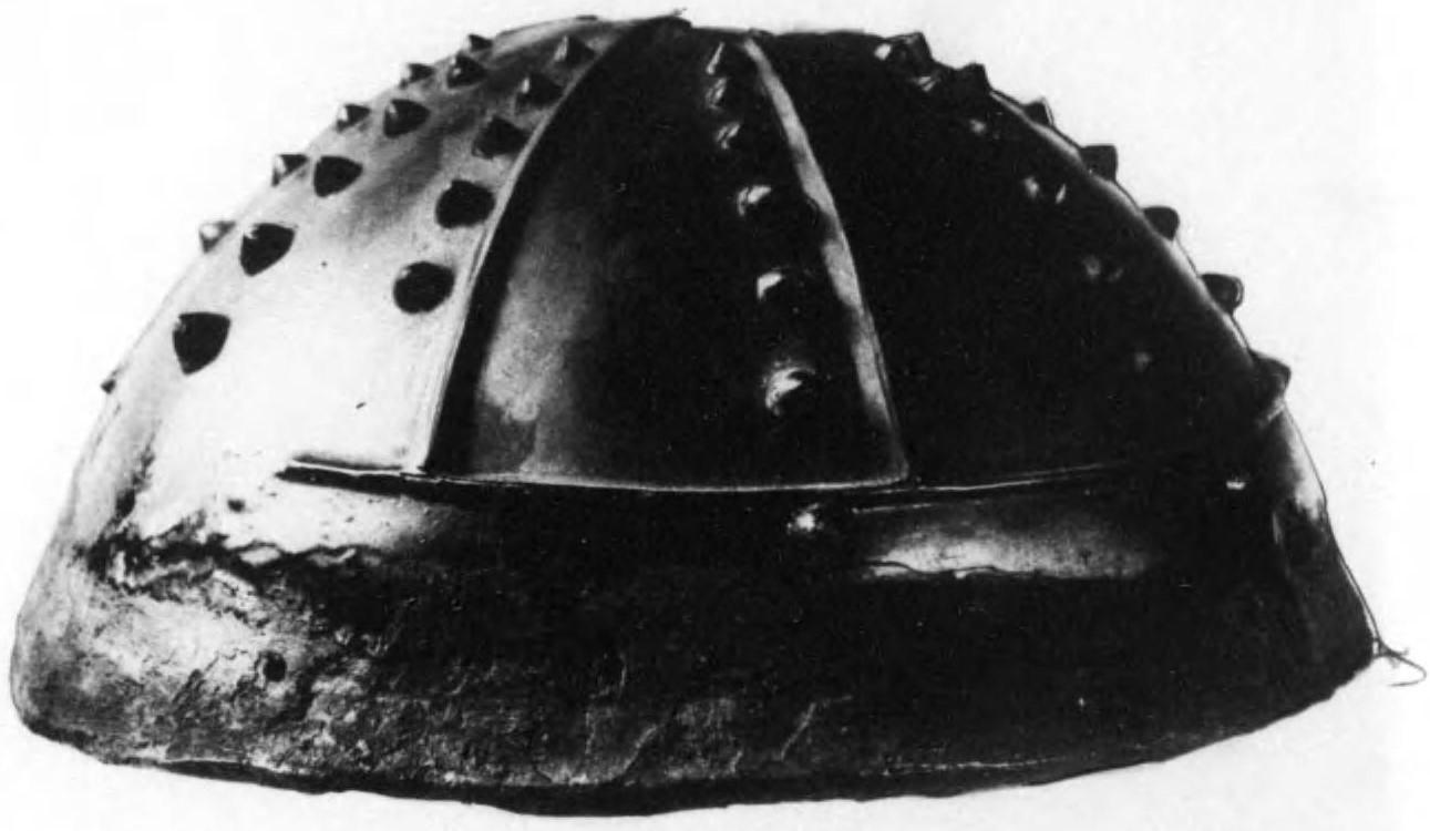 石上神宮所蔵・黒塗練革星兜鉢の左側面。鎌倉時代の作。